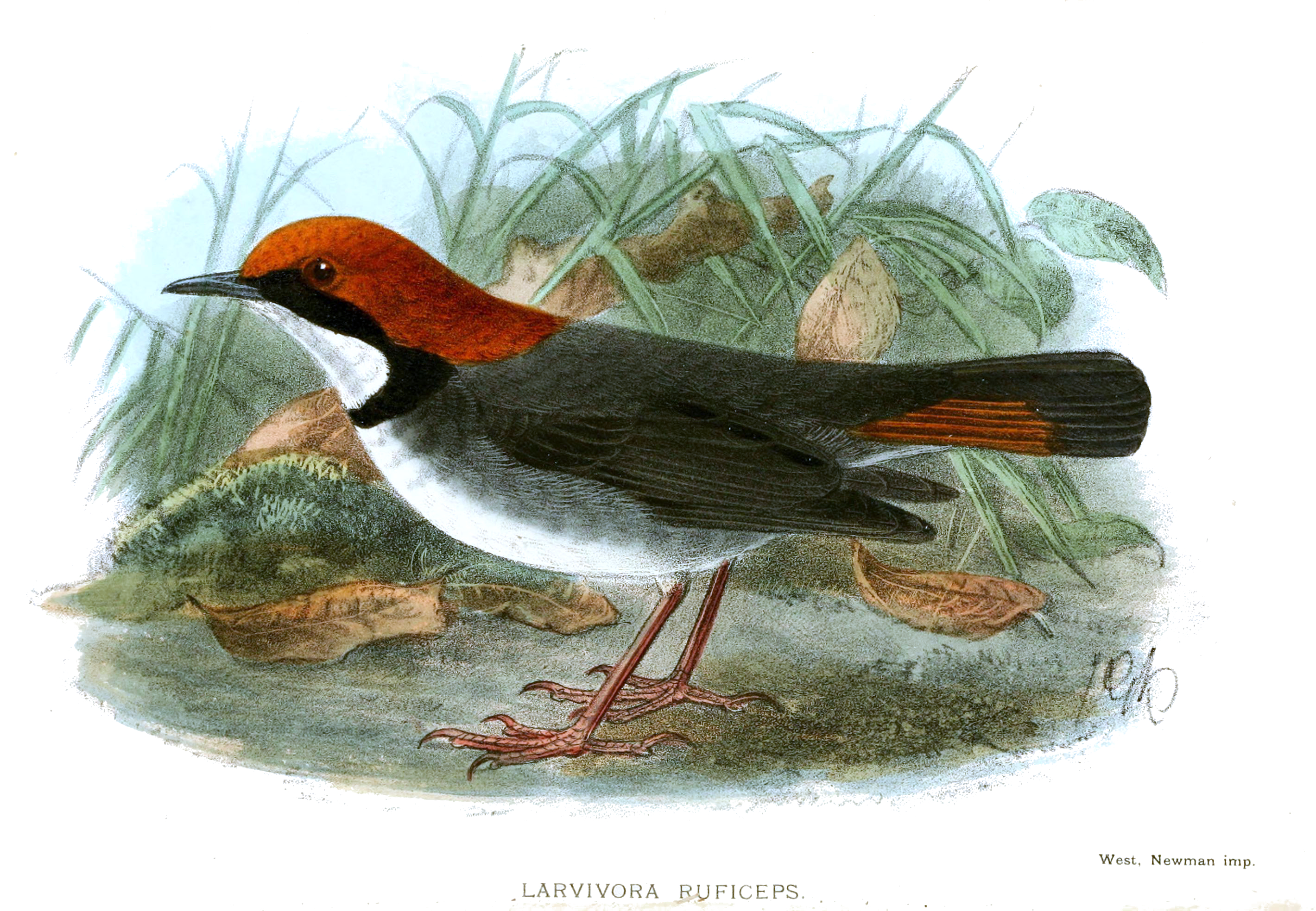 Larvivora ruficeps (syn. Luscinia ruficeps)